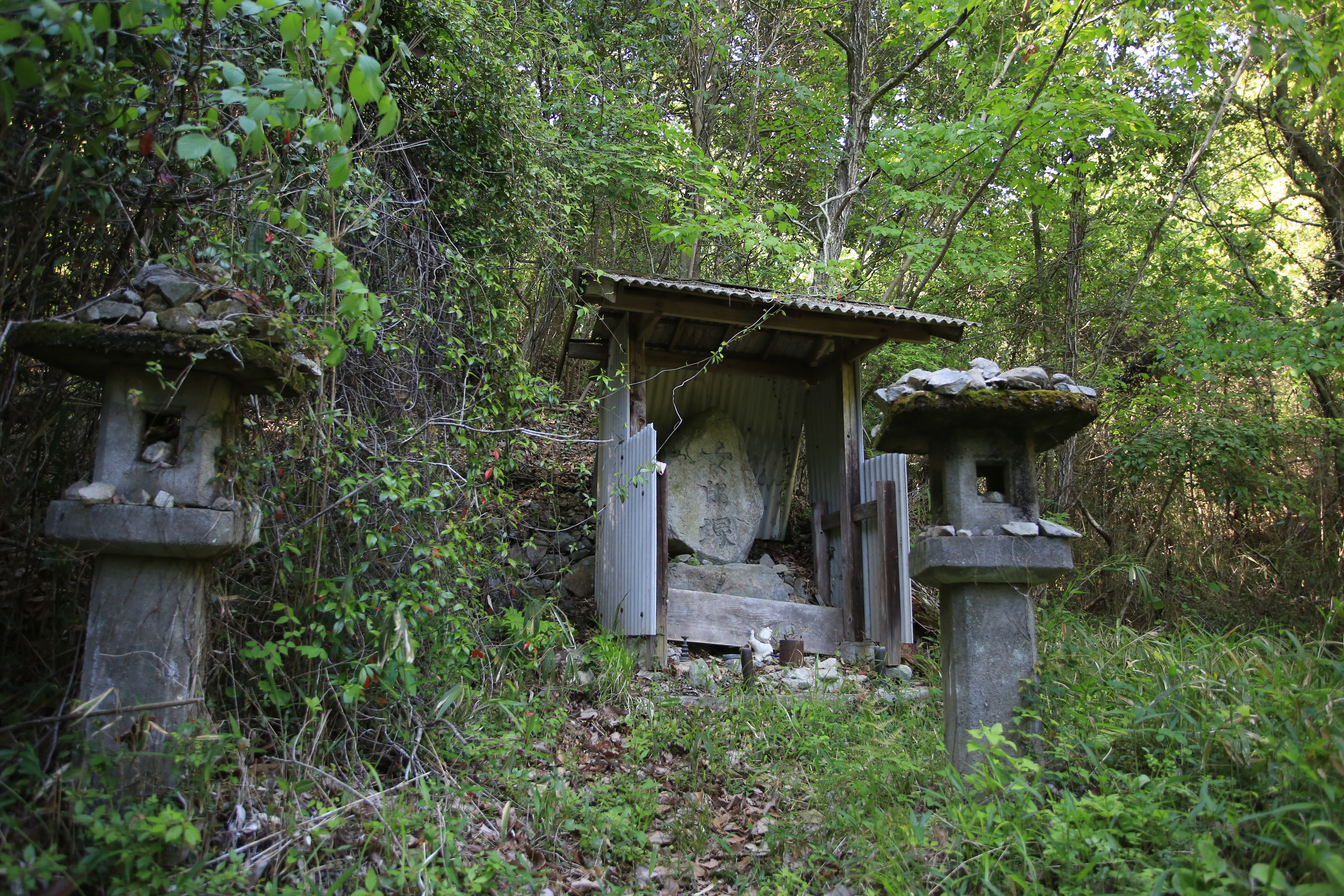 広島県福山市津之郷にある俄山弘法大師堂の北側の山中にある女郎塚